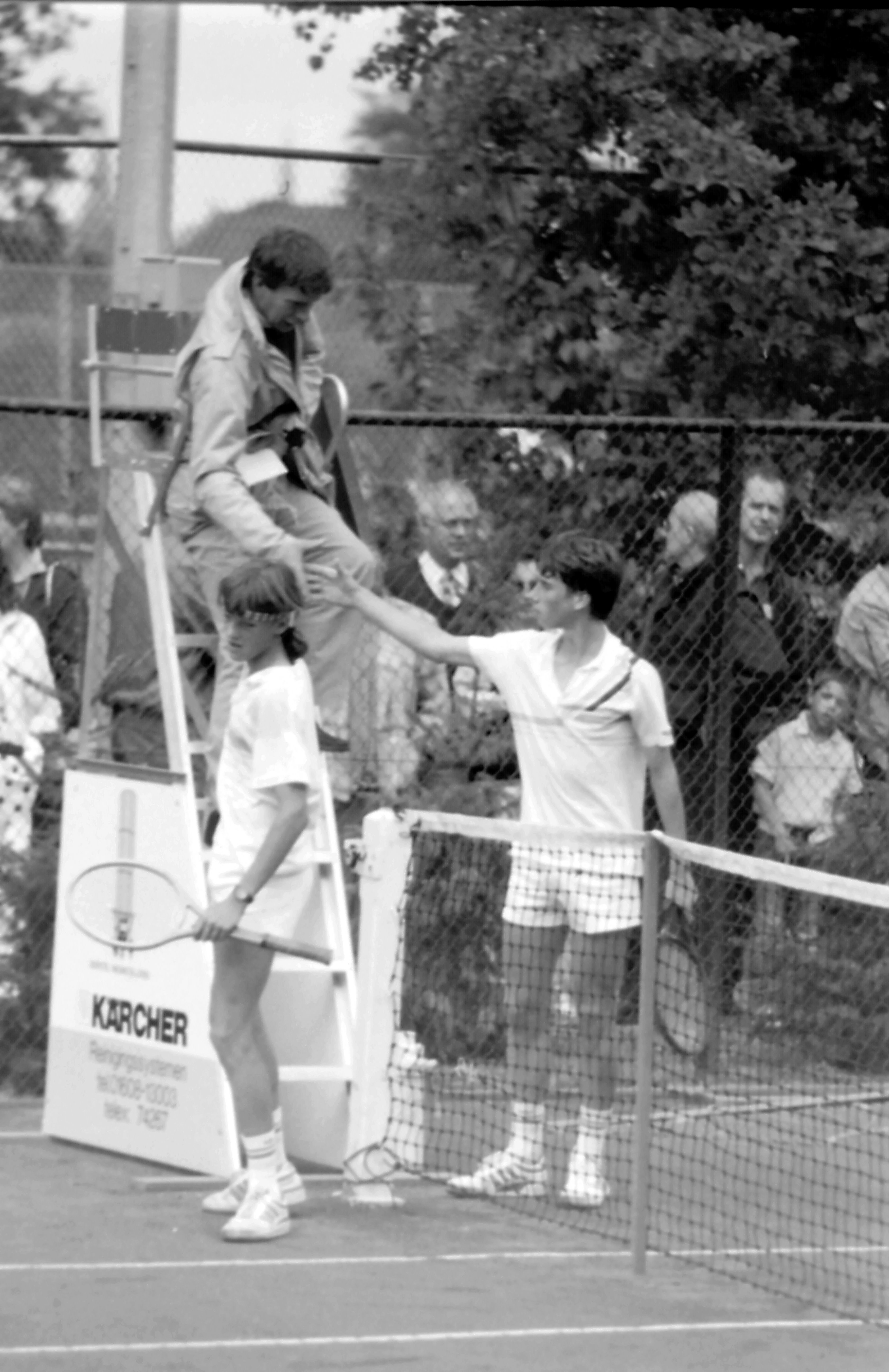 Paul Dogger